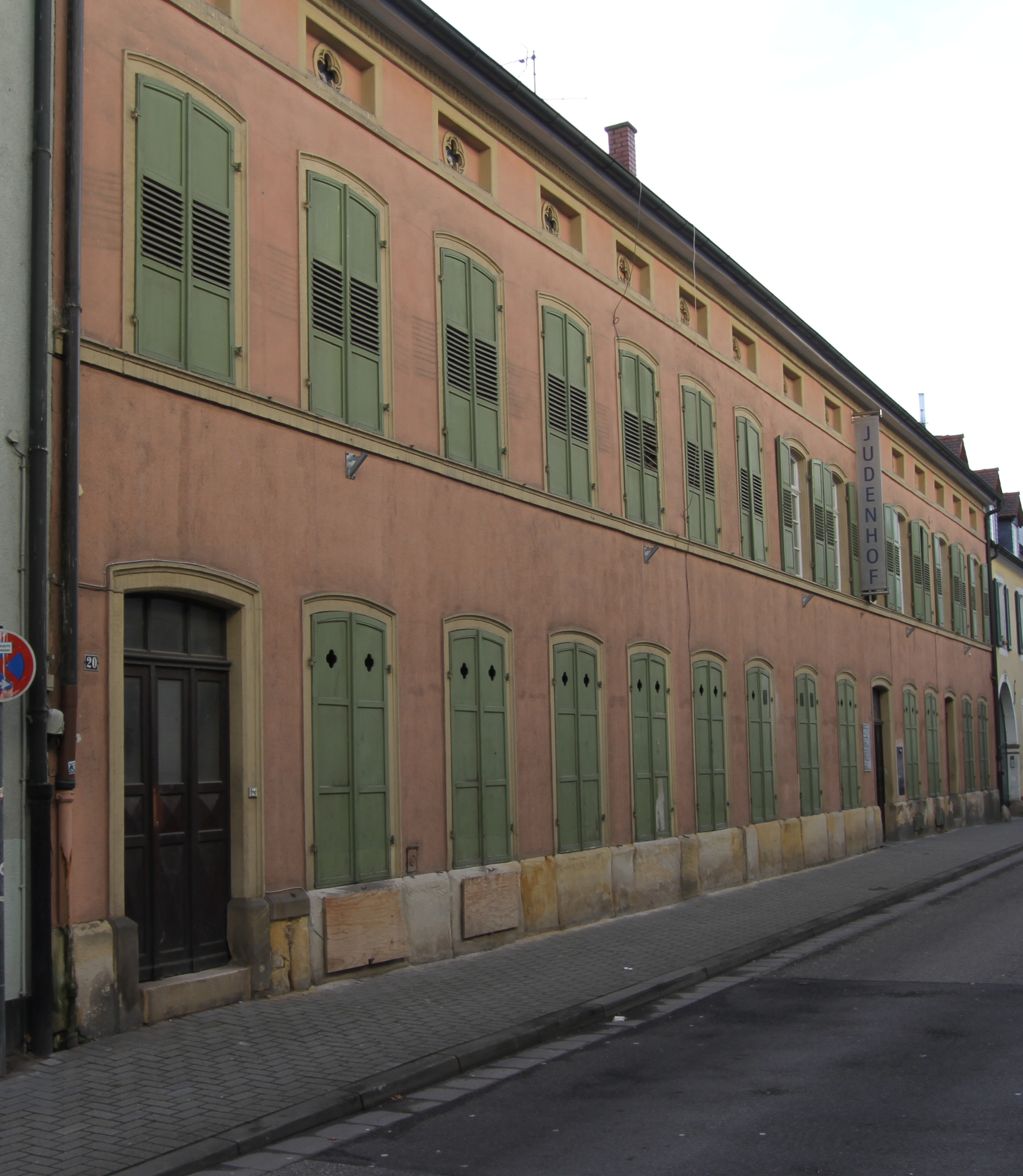 Doppelwohnhaus